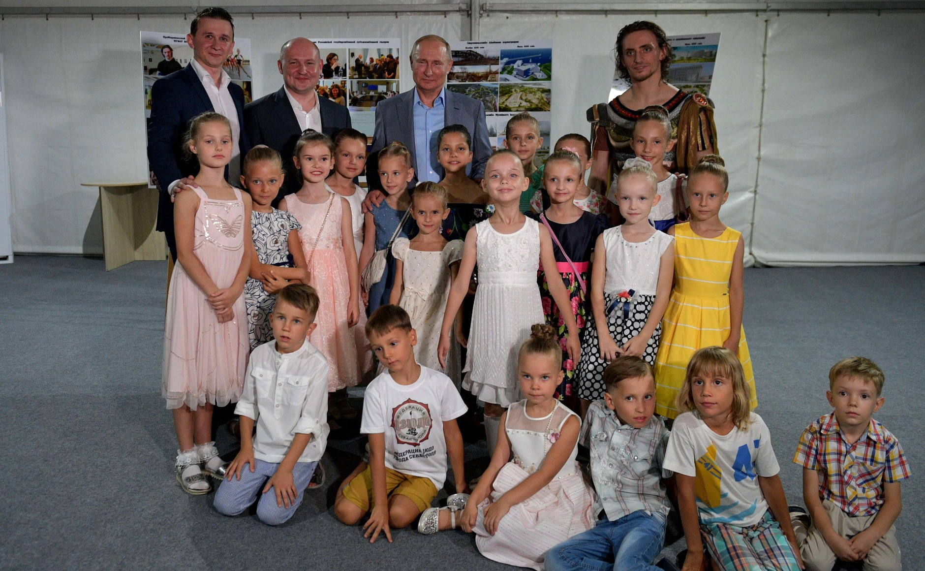 Президент России Владимир Путин, врио Губернатора Севастополя Михаил Развожаев и ио ректора Академии хореографии Севастополя Сергей Полунин с будущими учащимися Академии хореографии Севастополя